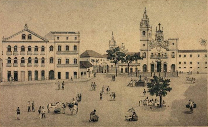 Litografia: Pátio do Carmo e a Basílica e Convento de Nossa Senhora do Carmo - Recife, Pernambuco, Brasil